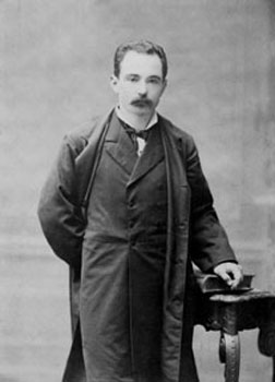 Valentín Letelier Madariaga (* Linares, 1852 - † Santiago, 19 de junio de 1919) fue un político e intelectual chileno, nace en el seno de una familia agrícola de la zona. Siendo muy pequeño se traslada a la vecina Talca para seguir sus estudios, los que continuaría posteriormente en el Instituto Nacional de Santiago. Luego, se recibiría de abogado en la Universidad de Chile.